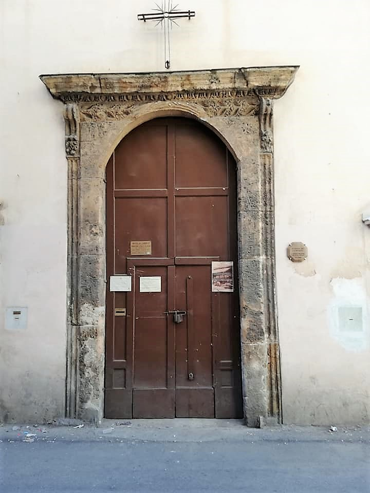 Portalino prospetto.